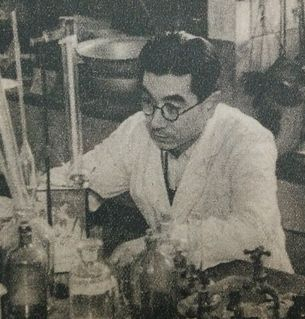 桂広太郎（薬学者。桂太郎の孫）